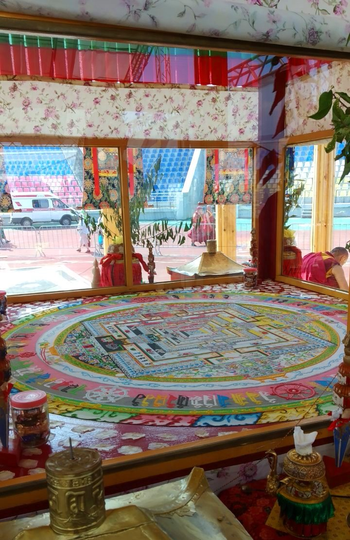 Kalachakra mandala in a special glass pavilion.